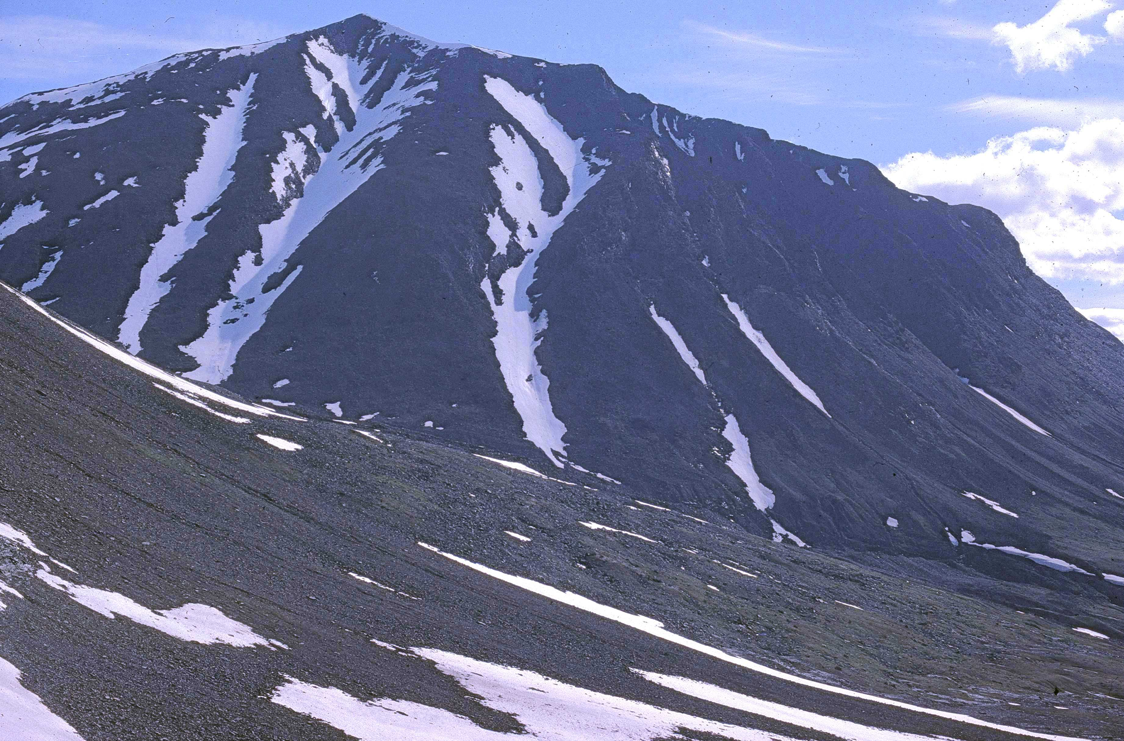 Ritatjåkko från väster.